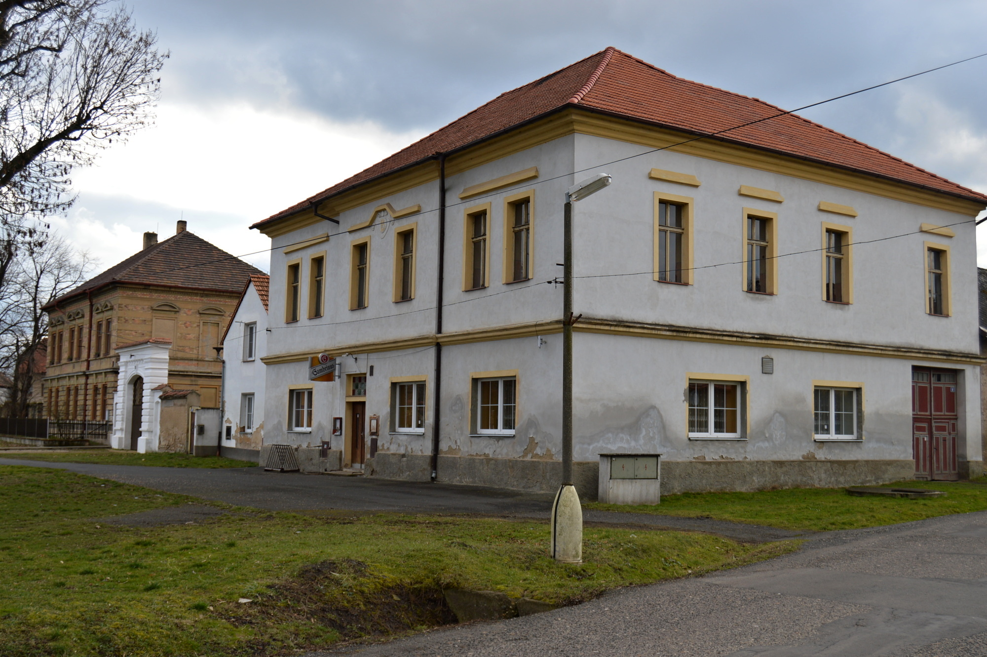 Radešín hostinec č. 91